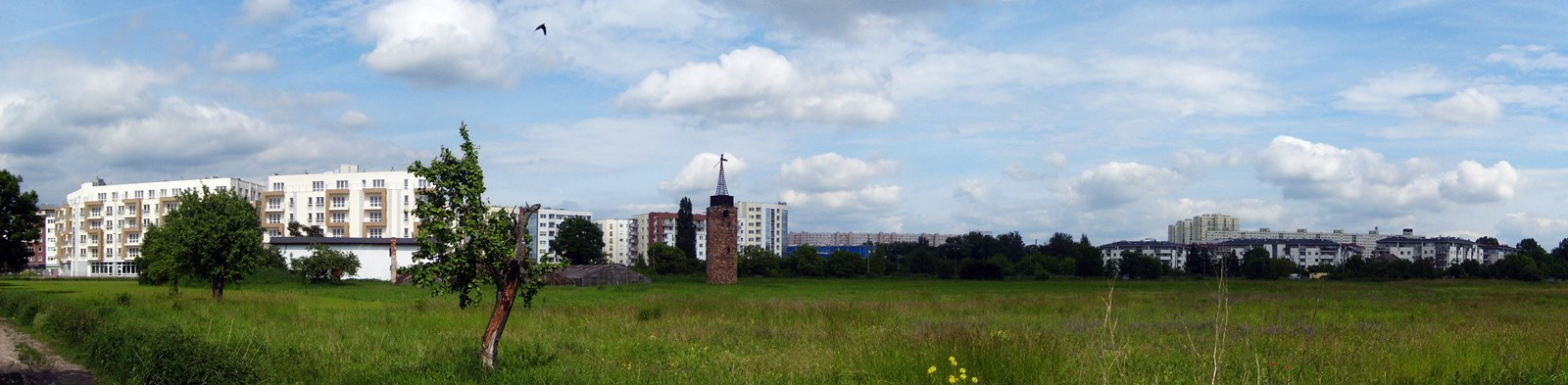 Poznań, Milczańska, wiatrak - widok z ul. Katowickiej w kierunku Malty